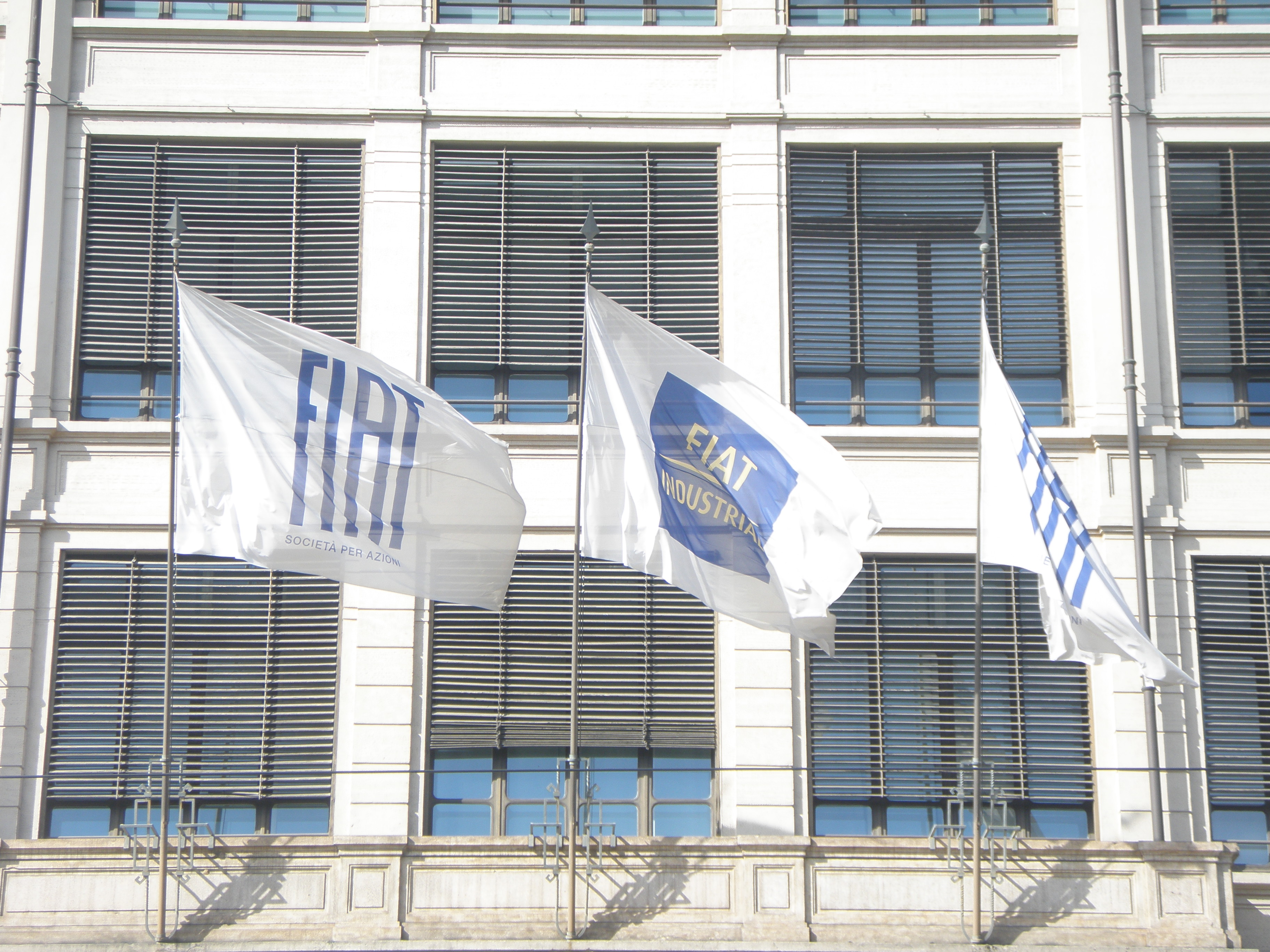 Sede del Grupo FIAT